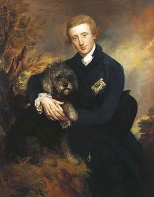 Retrato do duque de Buccleuch